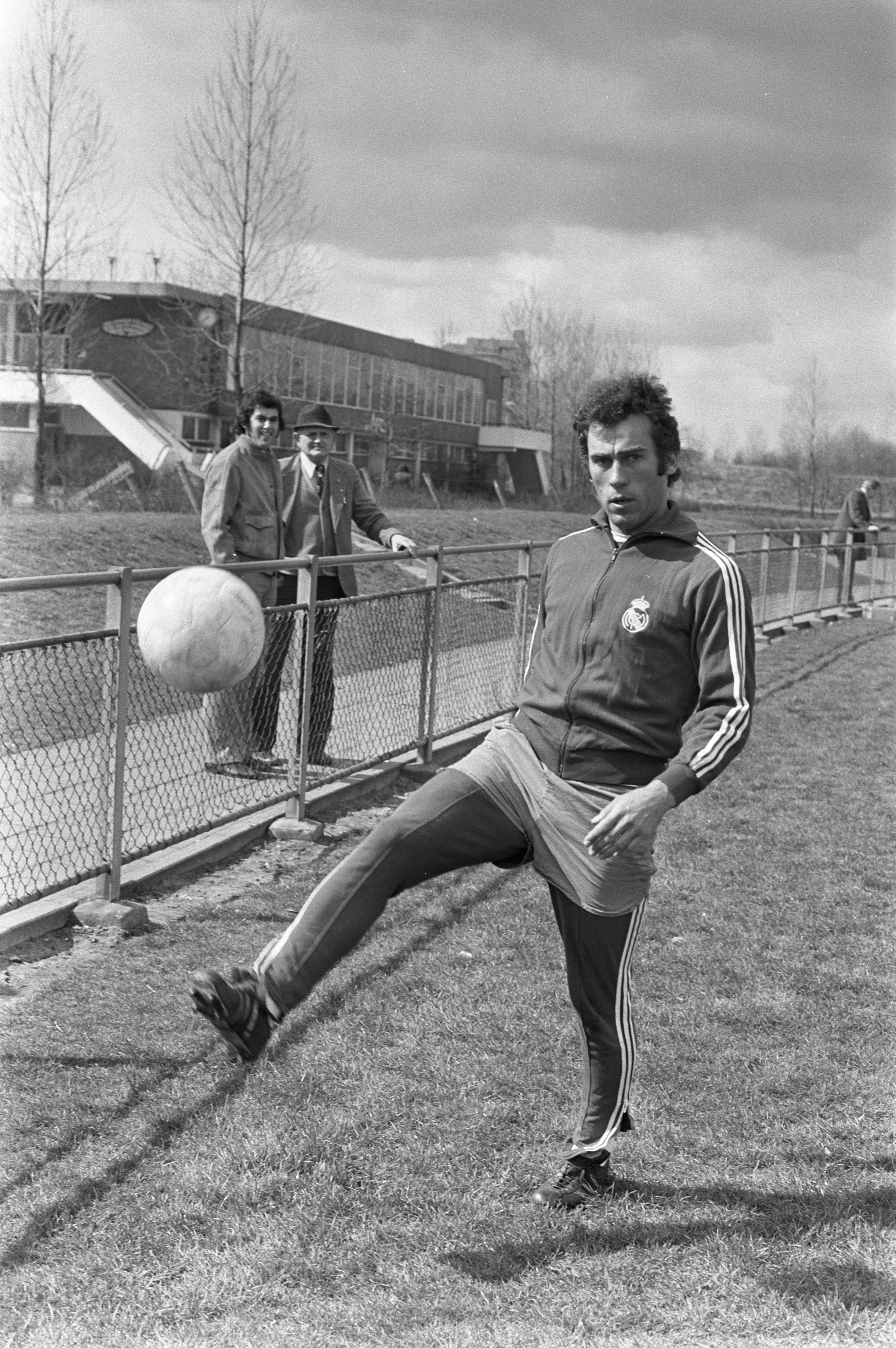 Collectie / Archief : Fotocollectie Anefo Reportage / Serie : [ onbekend ] Beschrijving : Training Real Madrid in Amsterdam, Amancio Datum : 9 april 1973 Locatie : Amsterdam, Noord-Holland Trefwoorden : sport, trainingen, voetbal Instellingsnaam : Real Madrid Fotograaf : Peters, Hans / Anefo Auteursrechthebbende : Nationaal Archief Materiaalsoort : Negatief (zwart/wit) Nummer archiefinventaris : bekijk toegang 2.24.01.05 Bestanddeelnummer : 926-3299